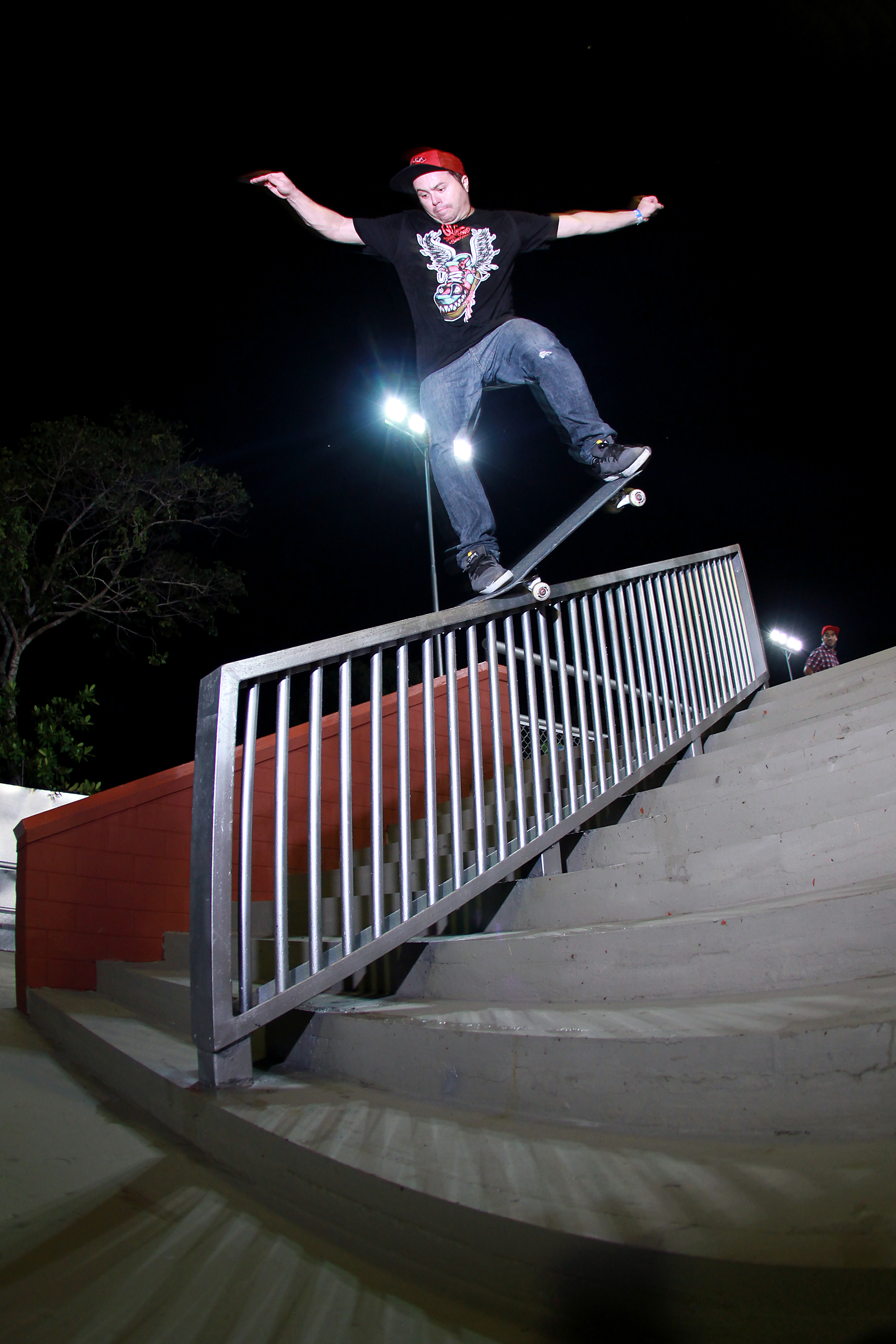 Crooked